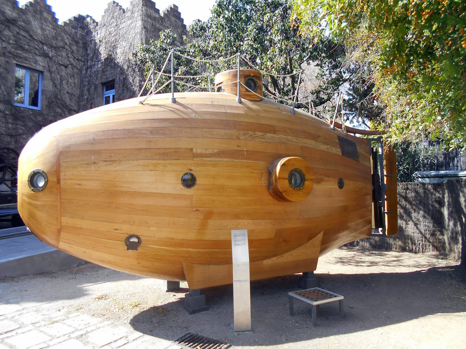 Ictineo I.